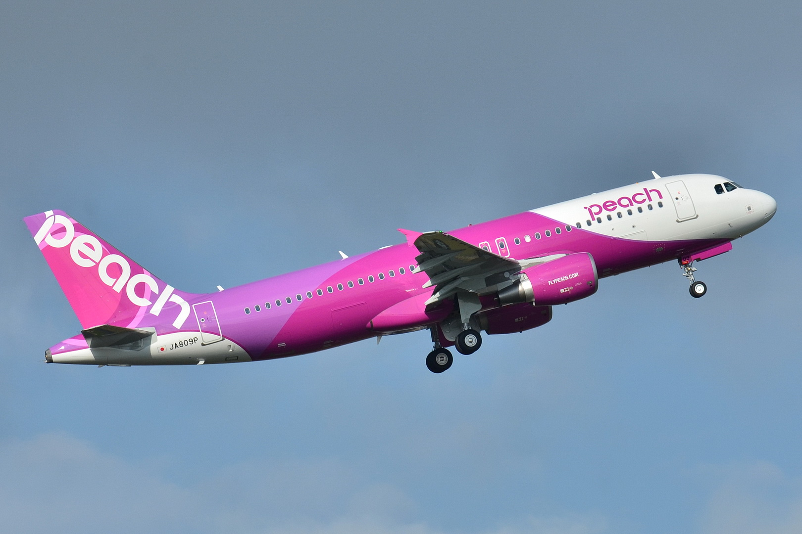 Photo prise à l'aéroport de Toulouse-Blagnac (LFBO) en France. Picture take at Toulouse-Blagnac Airport (LFBO) in France.